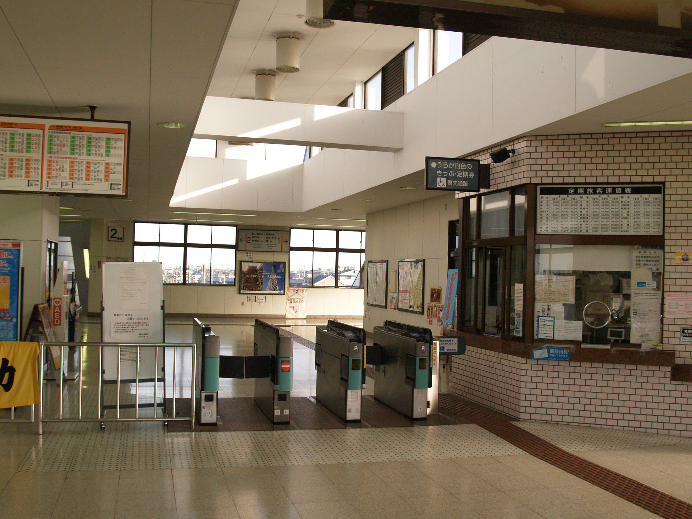 新古河駅改札口